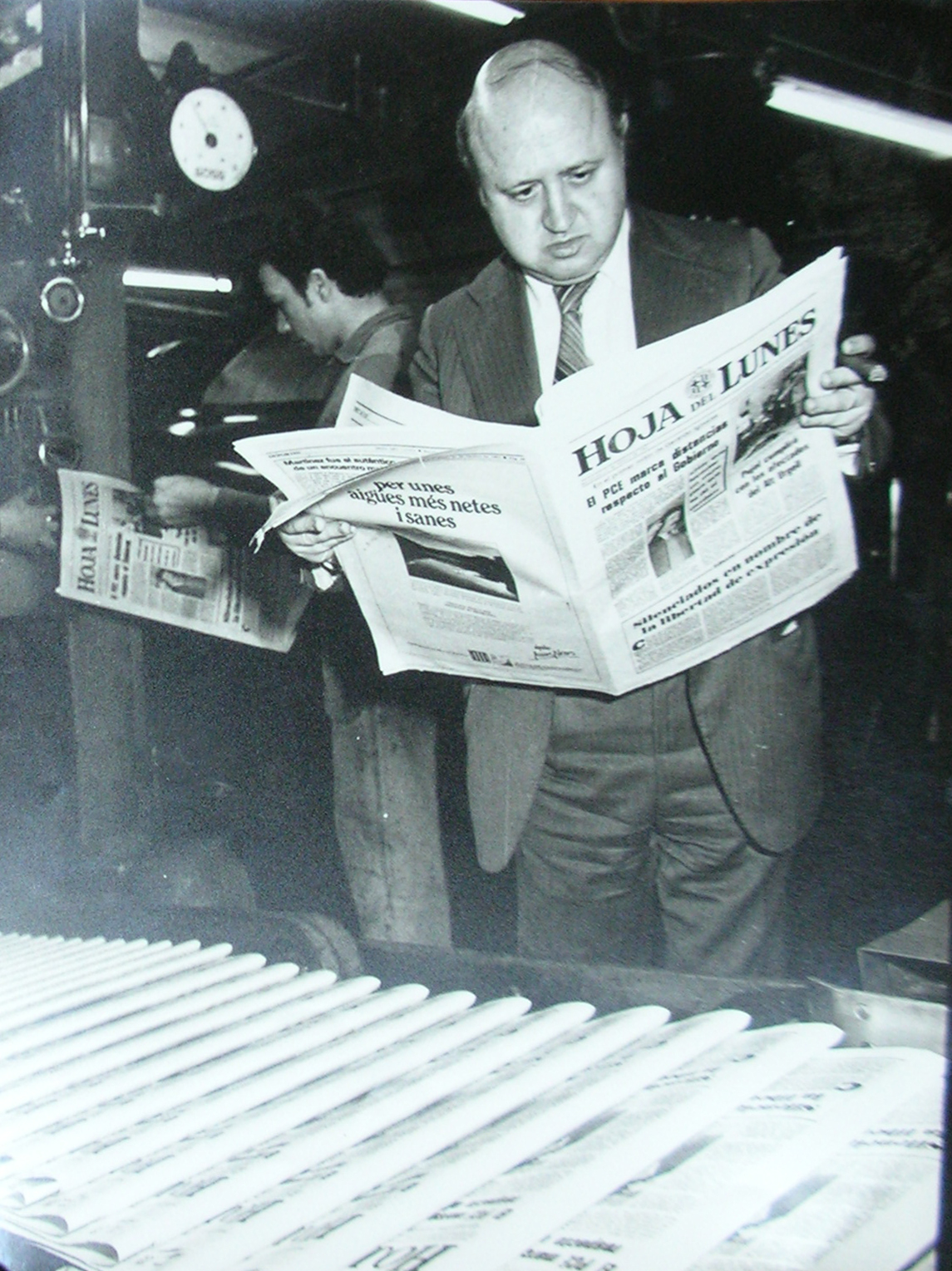 Josep M. Cadena a l'impremta de la Hoja del Lunes